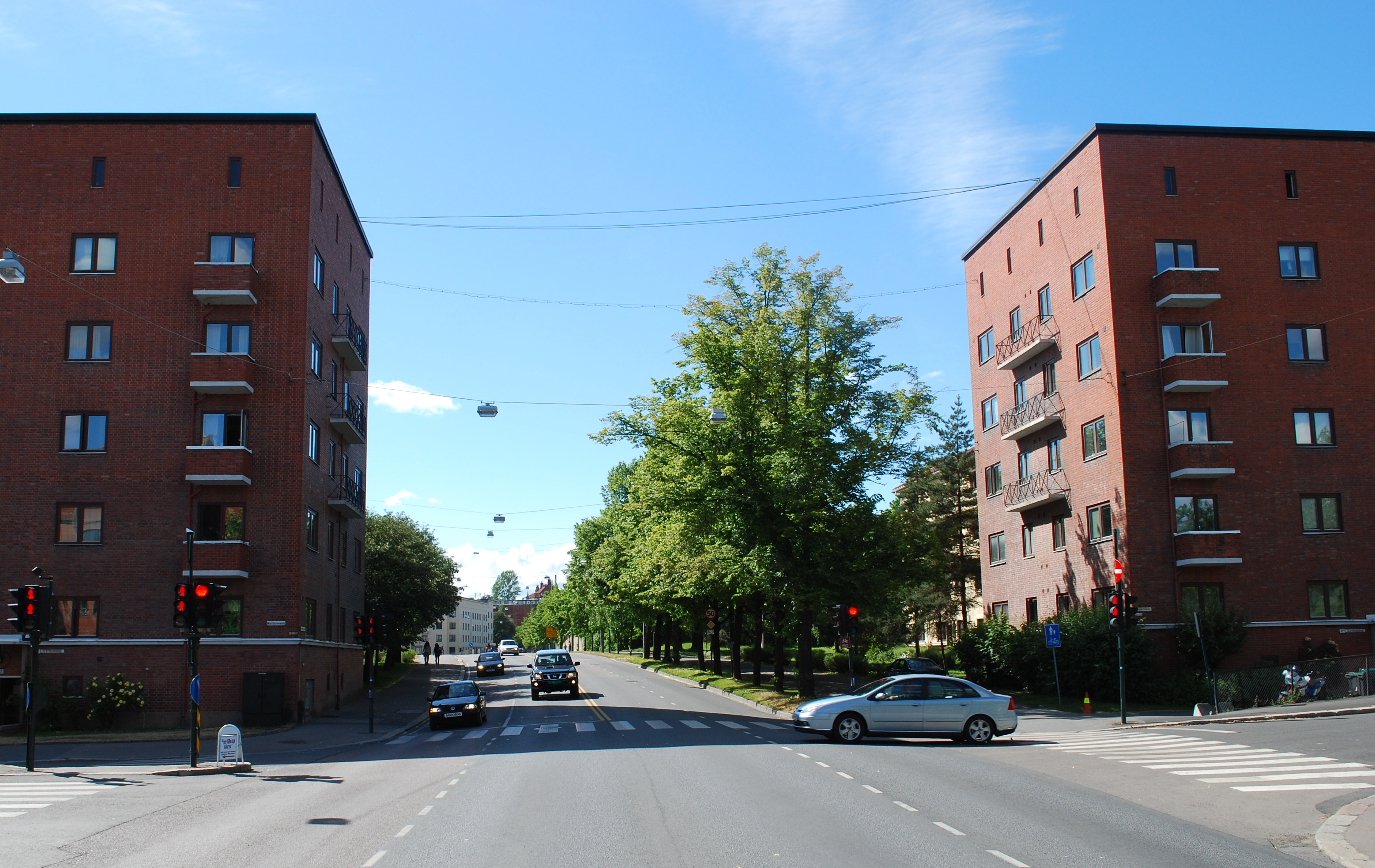 Griffenfledts gate, Sagene, Oslo, krysser Maridalsveien. Bildet tatt fra Vøyenbrua